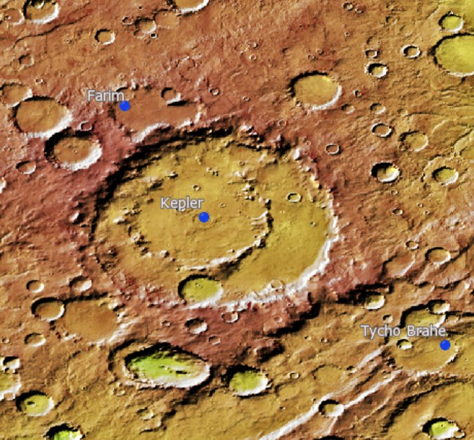 Cráter marciano Kepler.(Imagen IAU/USGS/Goddard/A SU/USGS)